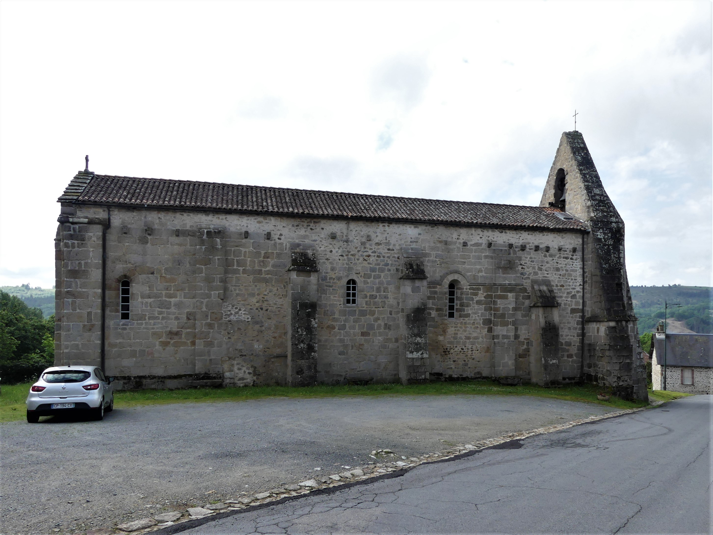 La façade nord de l'église de Clairavaux, Creuse, France.